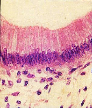 Simple columnar epithelium. HyE.